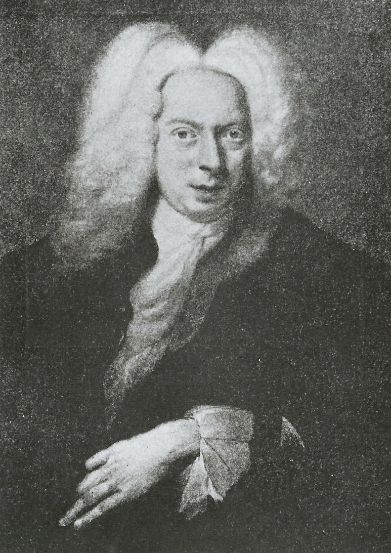 Philipp Heinrich I. von Stenglin, * Hamburg 12. Februar 1688, † dort 19. Oktober 1759, Bankier und Kaufmann in Hamburg